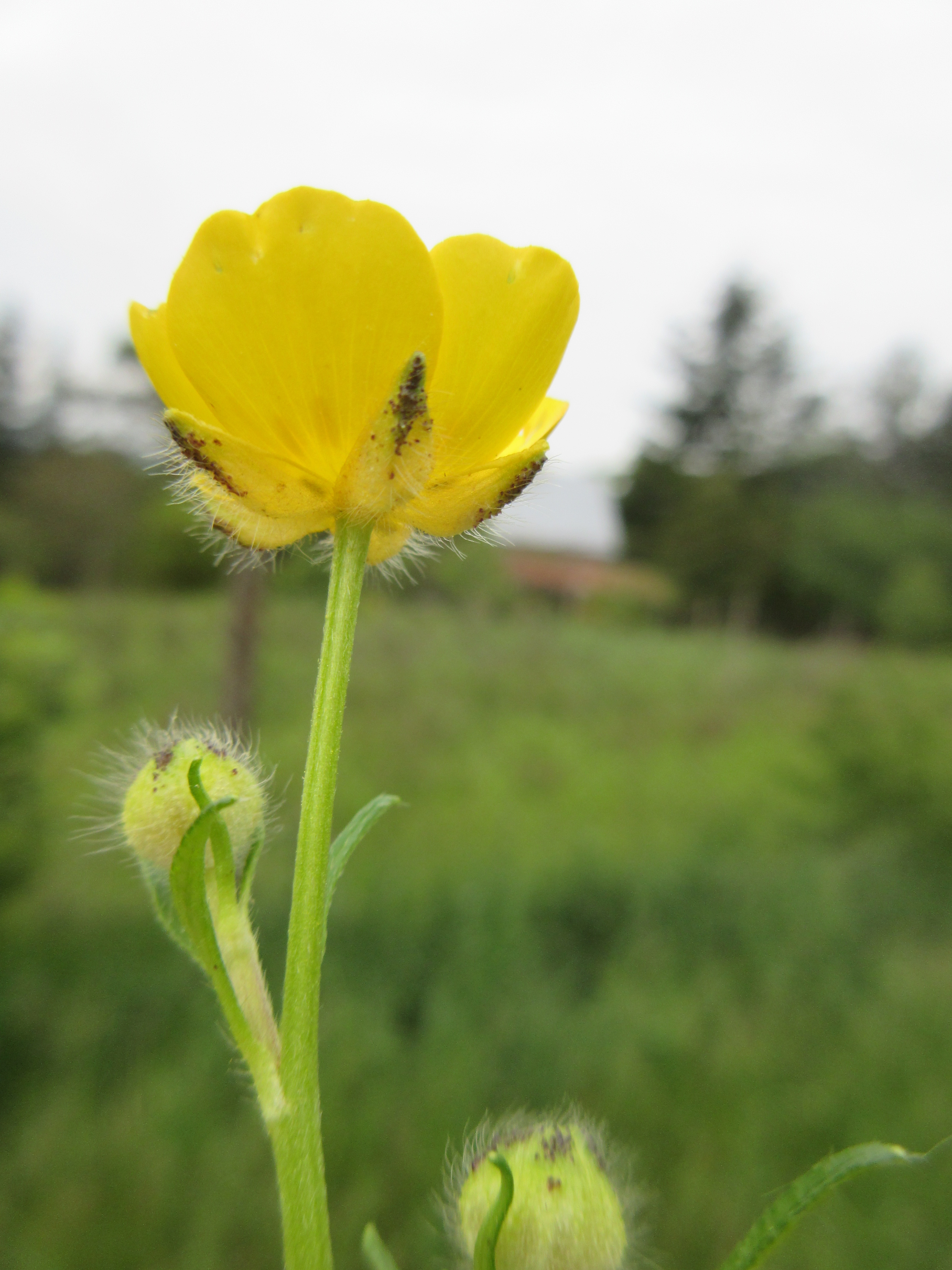 Ranunculus polyanthemos, Brno-Obřany, Czech Republic